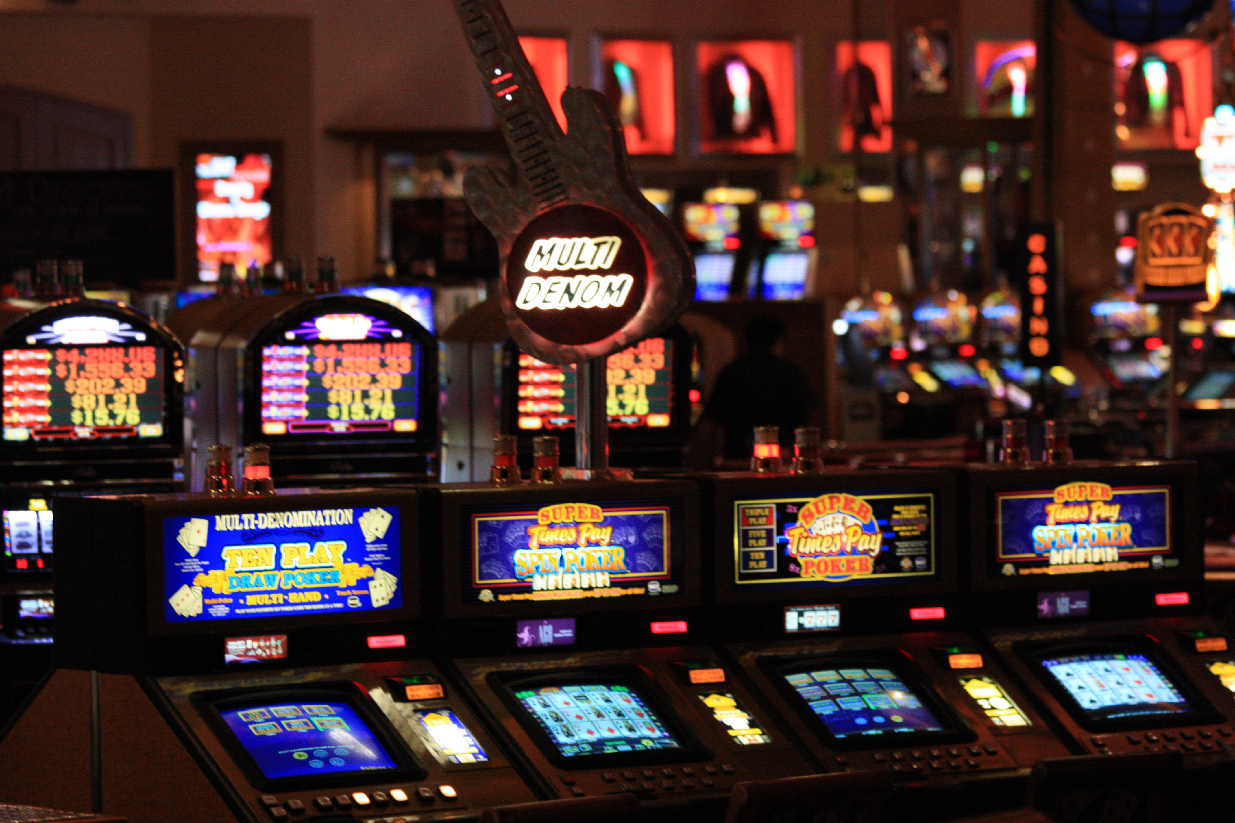 Hard Rock Casino, Las Vegas